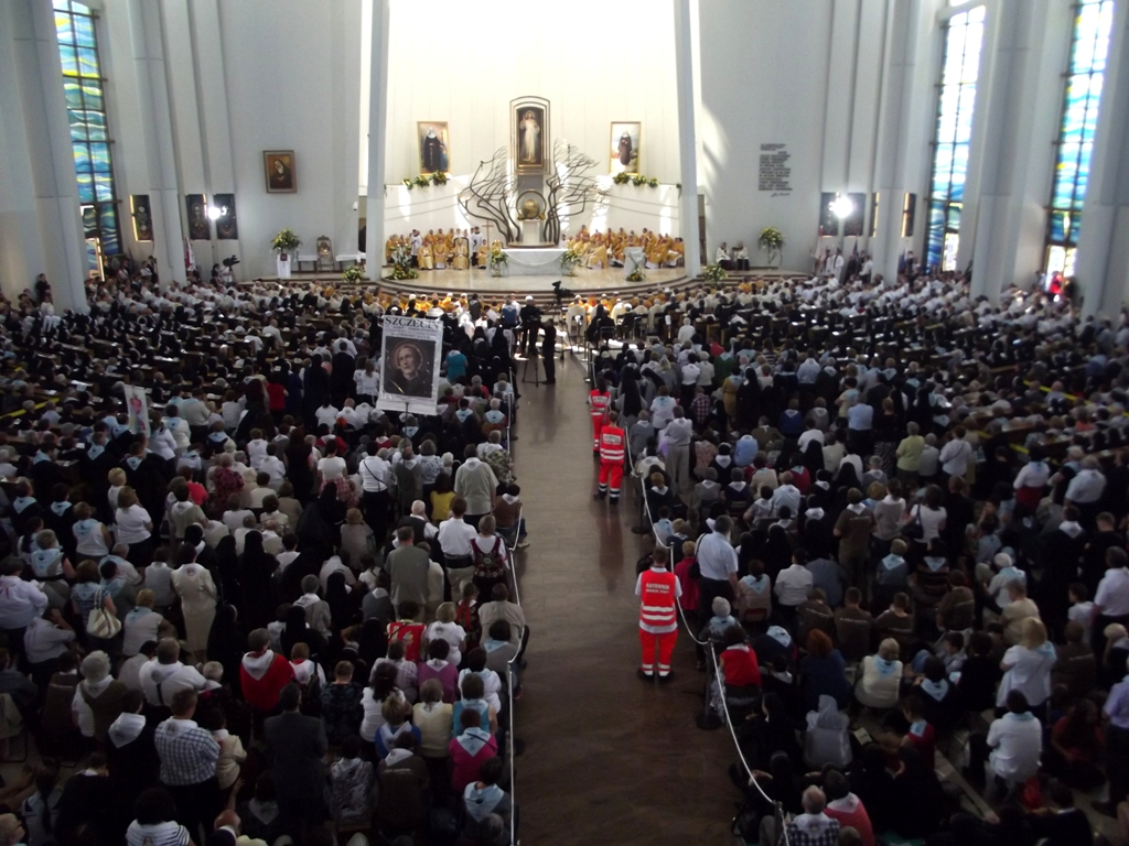 Zdjęcie zrobione podczas uroczystości beatyfikacji Zofii Czerskiej i Małgorzaty Szewczyk, w Sanktuarium Bożego Miłosierdzia w Łagiewnikach.